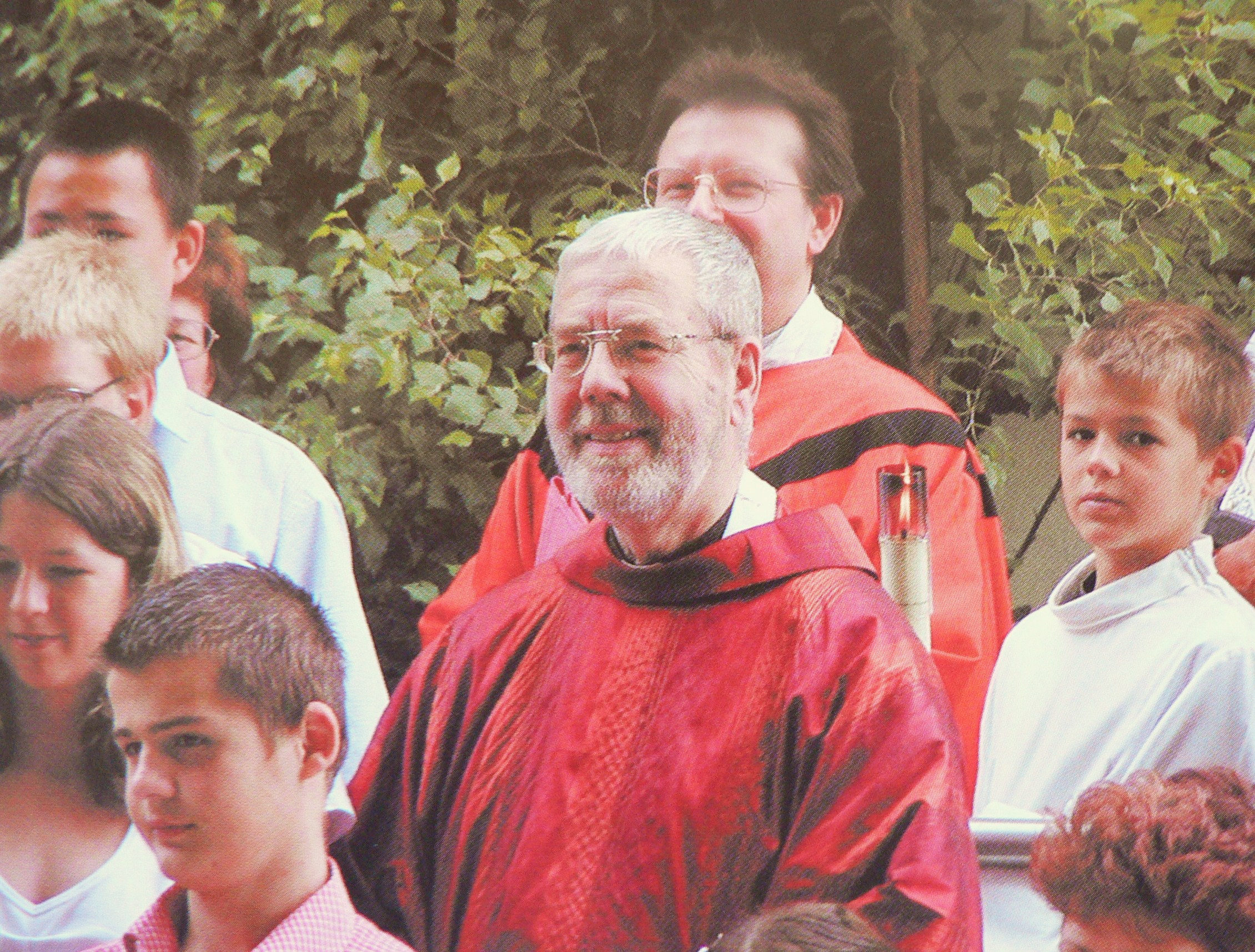 eigene Datei